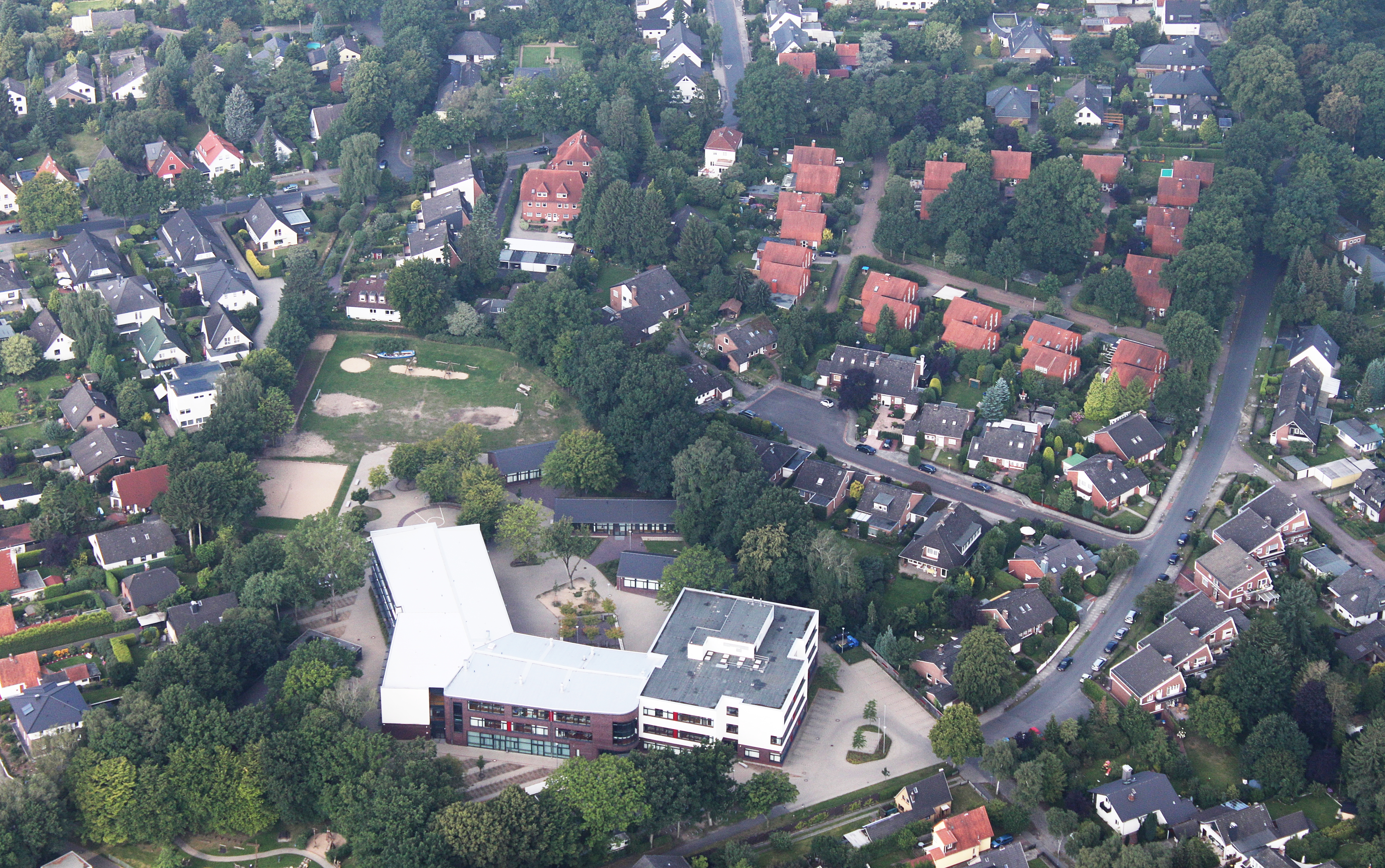 Luftaufnahme Bremen; Oberschule Rockwinkel; Flughöhe 500 m